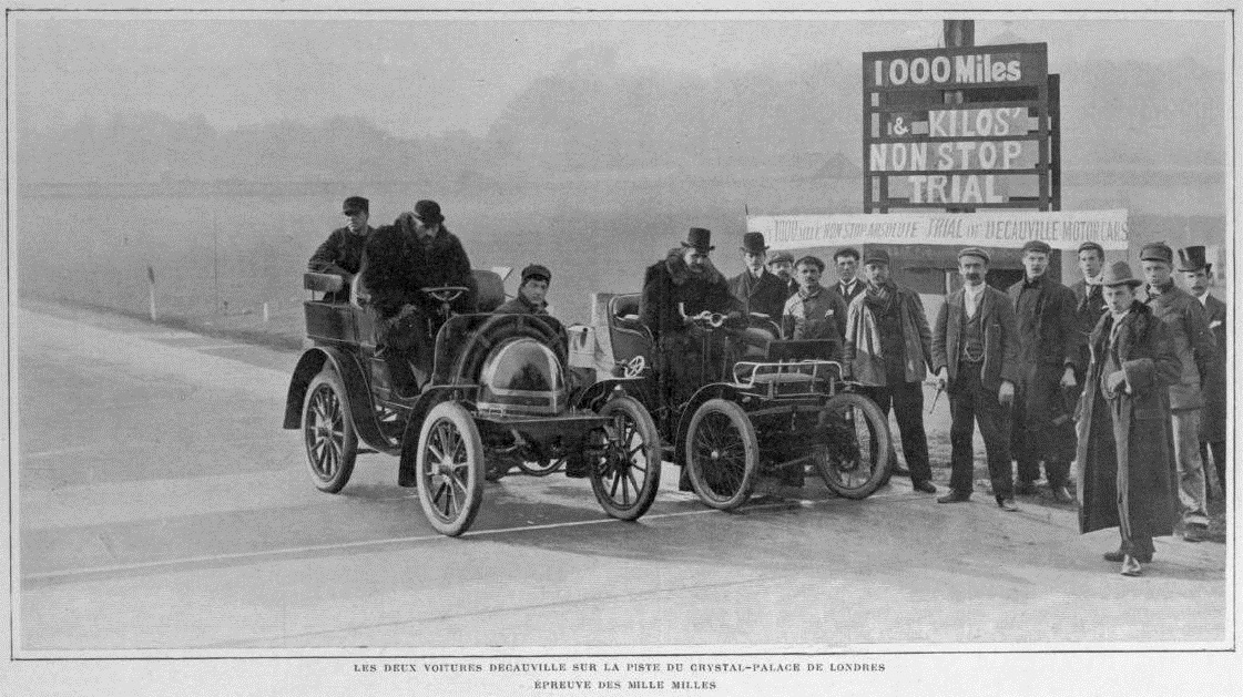 Les deux voitures Decauville 5HP au départ des Mille Milles de la piste de Crystal Palace, à Londres (années 1900).